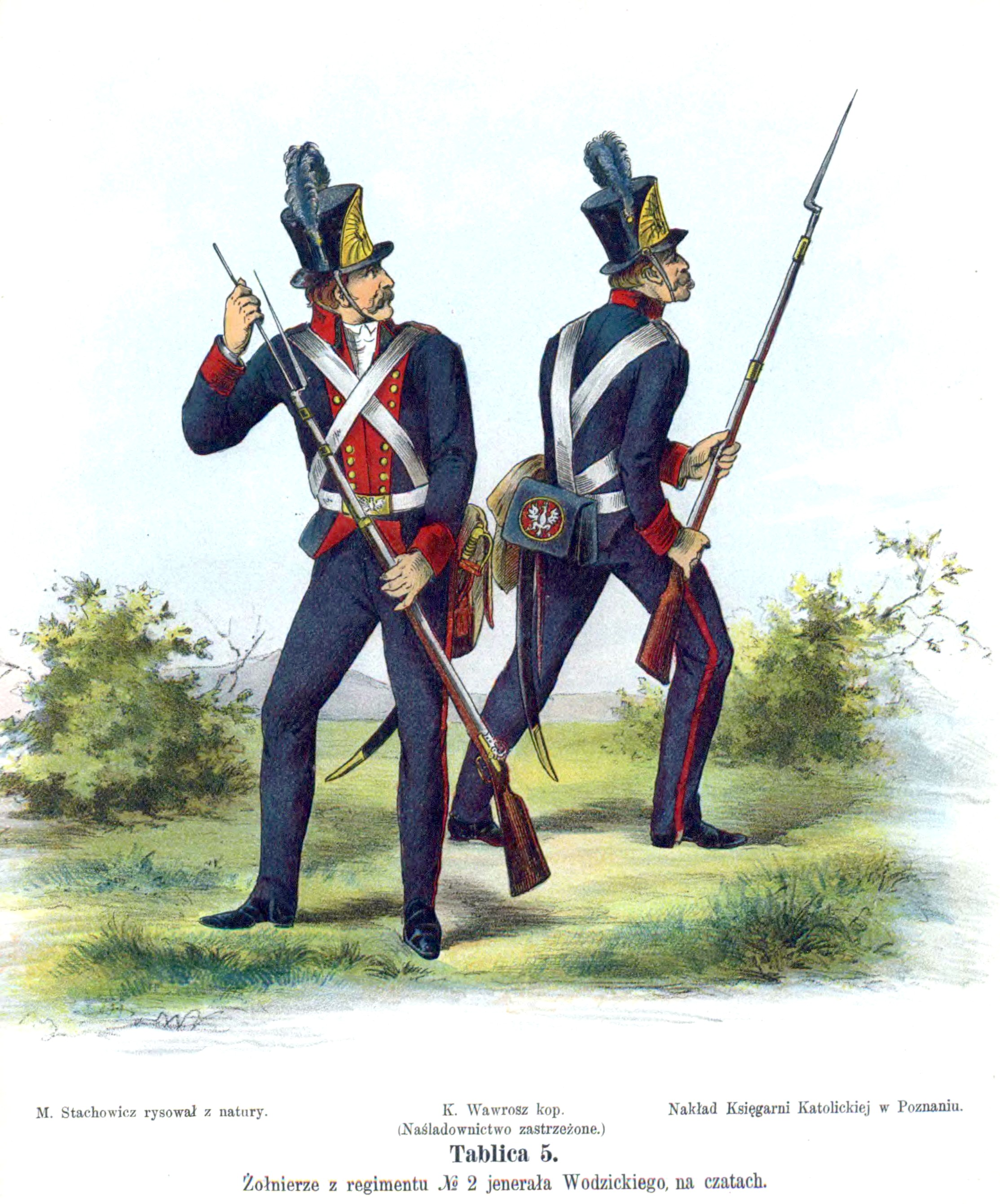 Kościuszko Uprising army